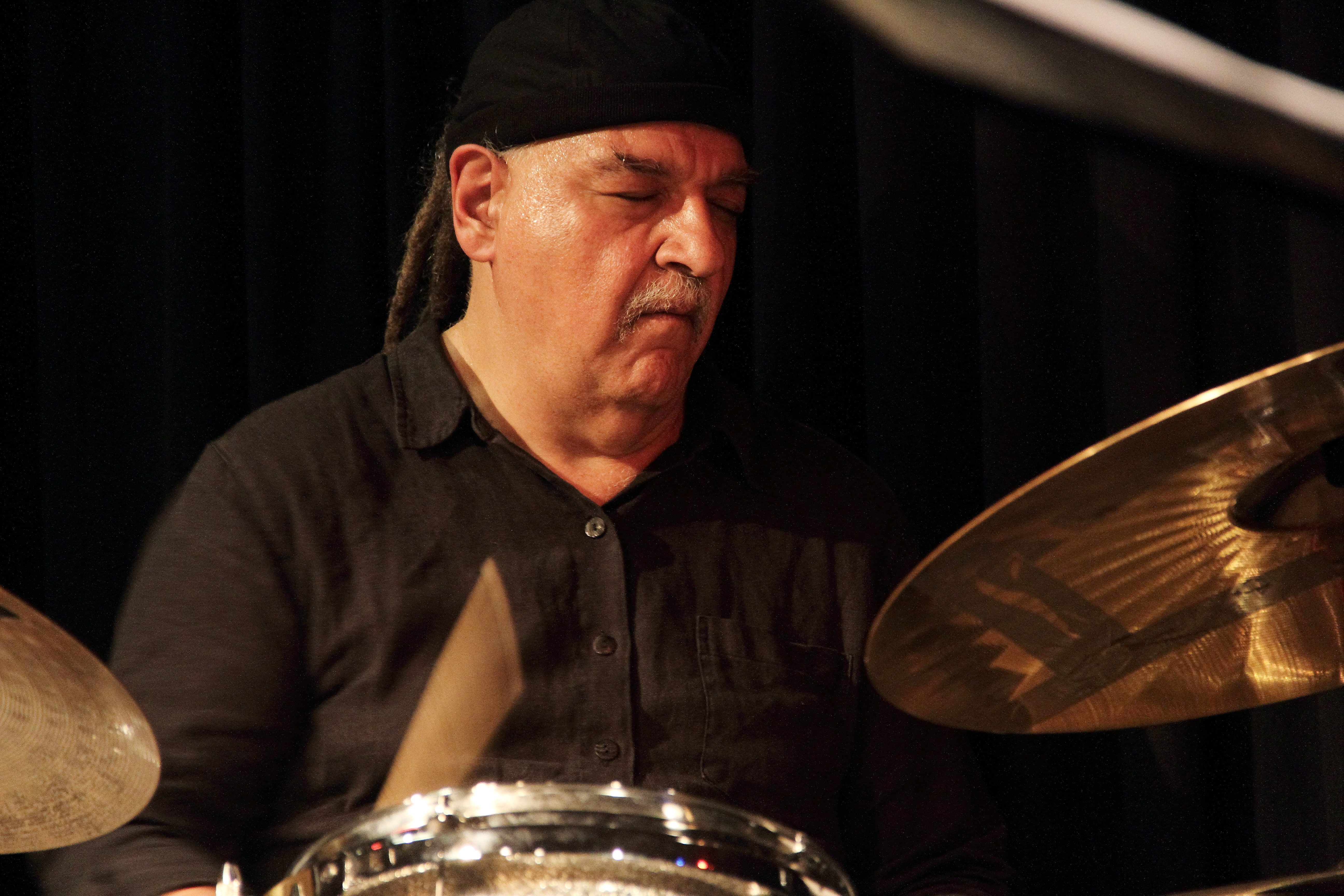 Konzert von Ullmann/Swell´s Chicago Plan im Club W71 in Weikersheim. Chicago Plan sind: Gebhard Ullmann (sax, bcl), Steve Swell (tromb), Fred Lonberg-Holm (cello, electr) und Michael Zerang (dr).